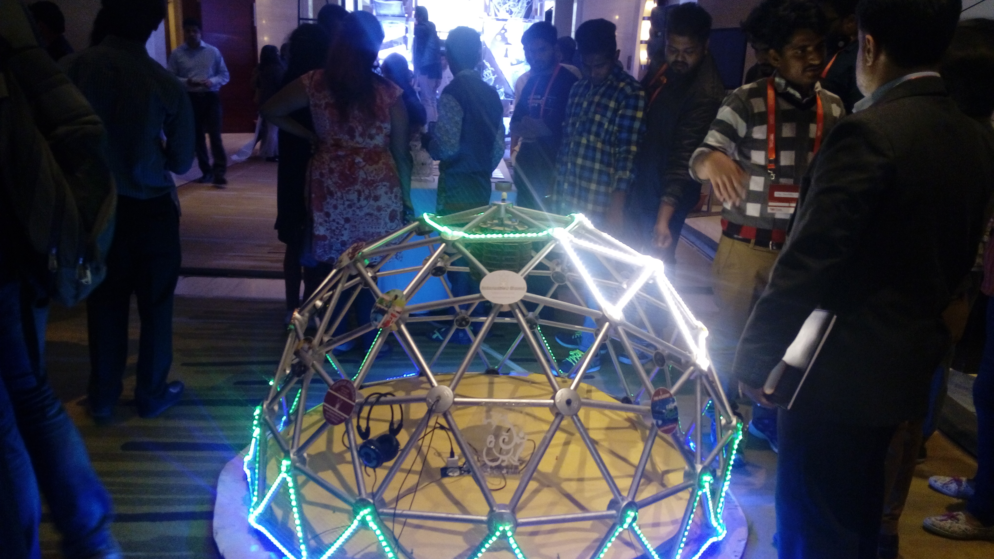 विज्ञान आश्रम संवादी dome